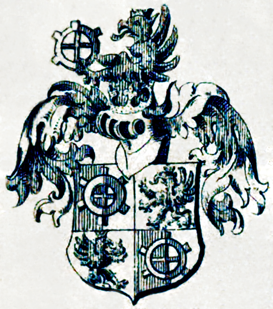 Wappen derer von Miller zu Aichholz 1691